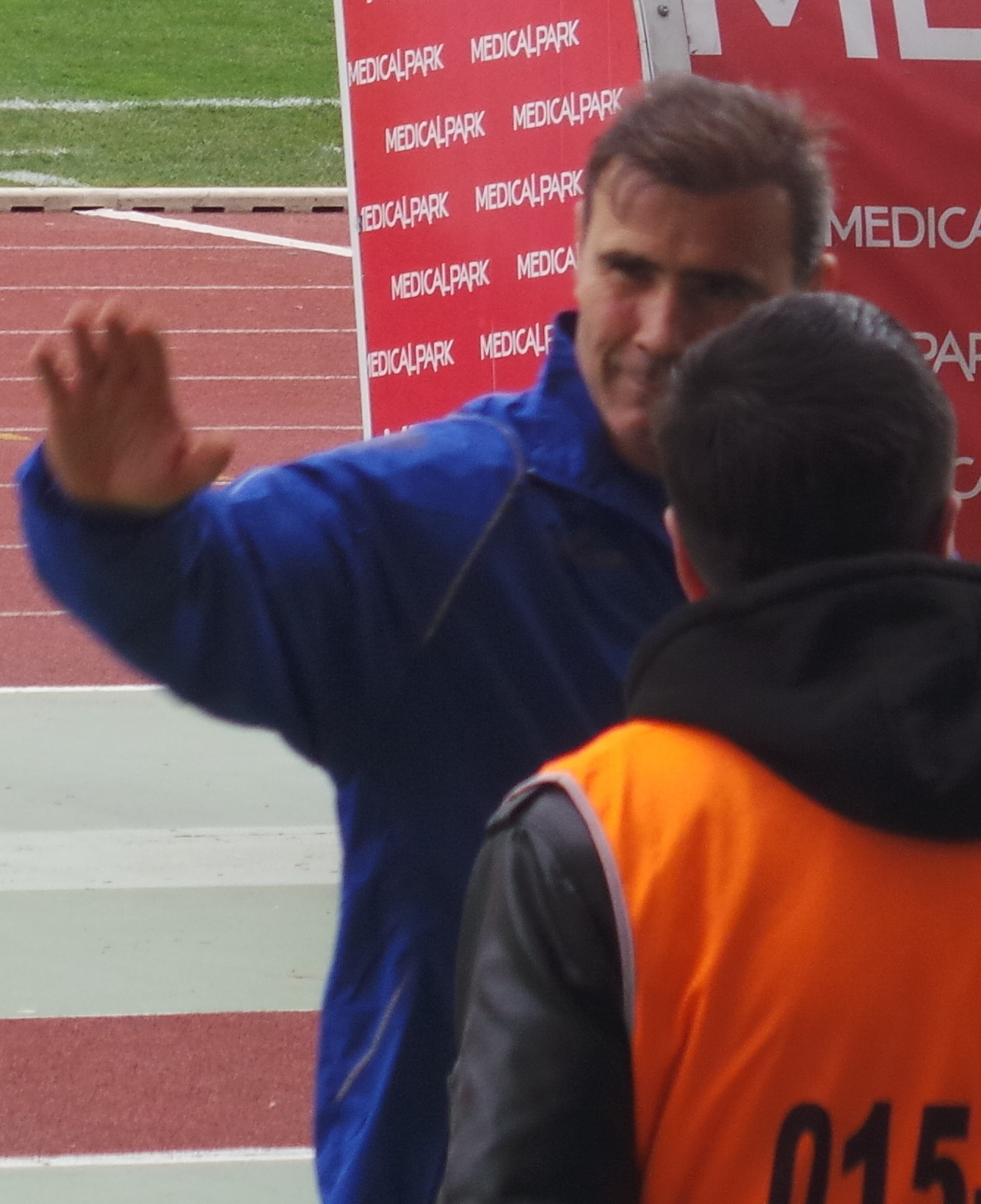 Hayrettin Demirbaş '14